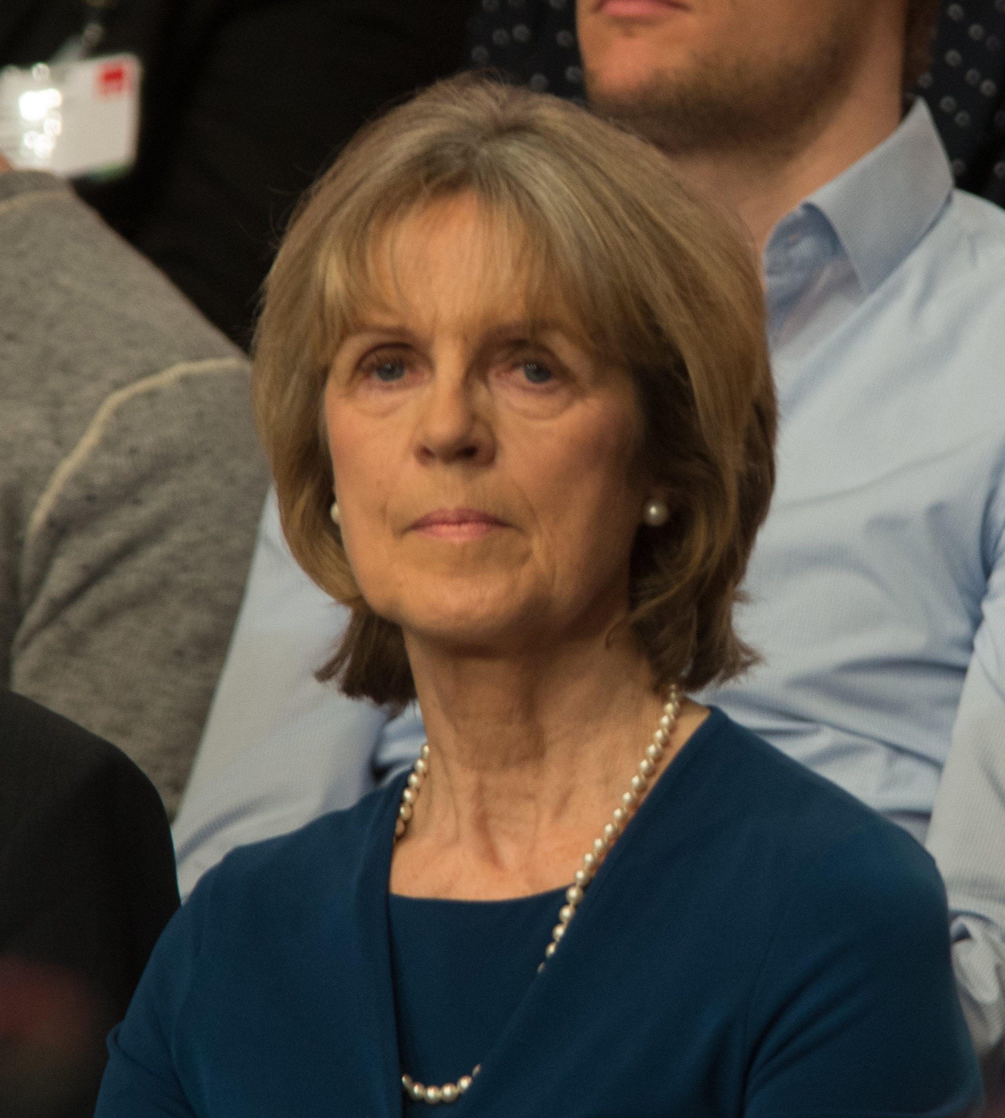 Bärbel Dieckmann auf dem SPD Bundesparteitag am 19. März 2017 in Berlin